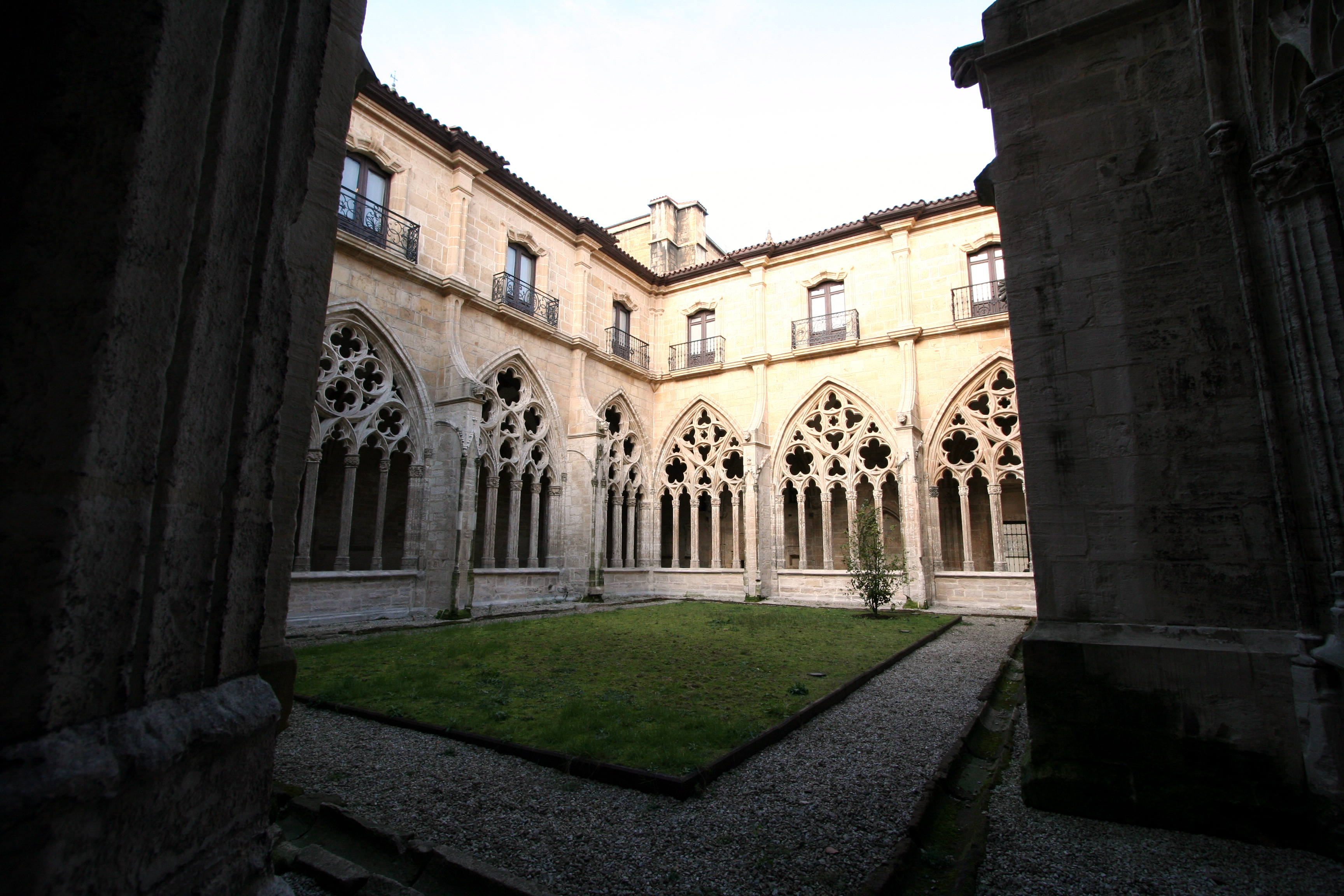 Claustro de la Catedral de OviedoOviedo